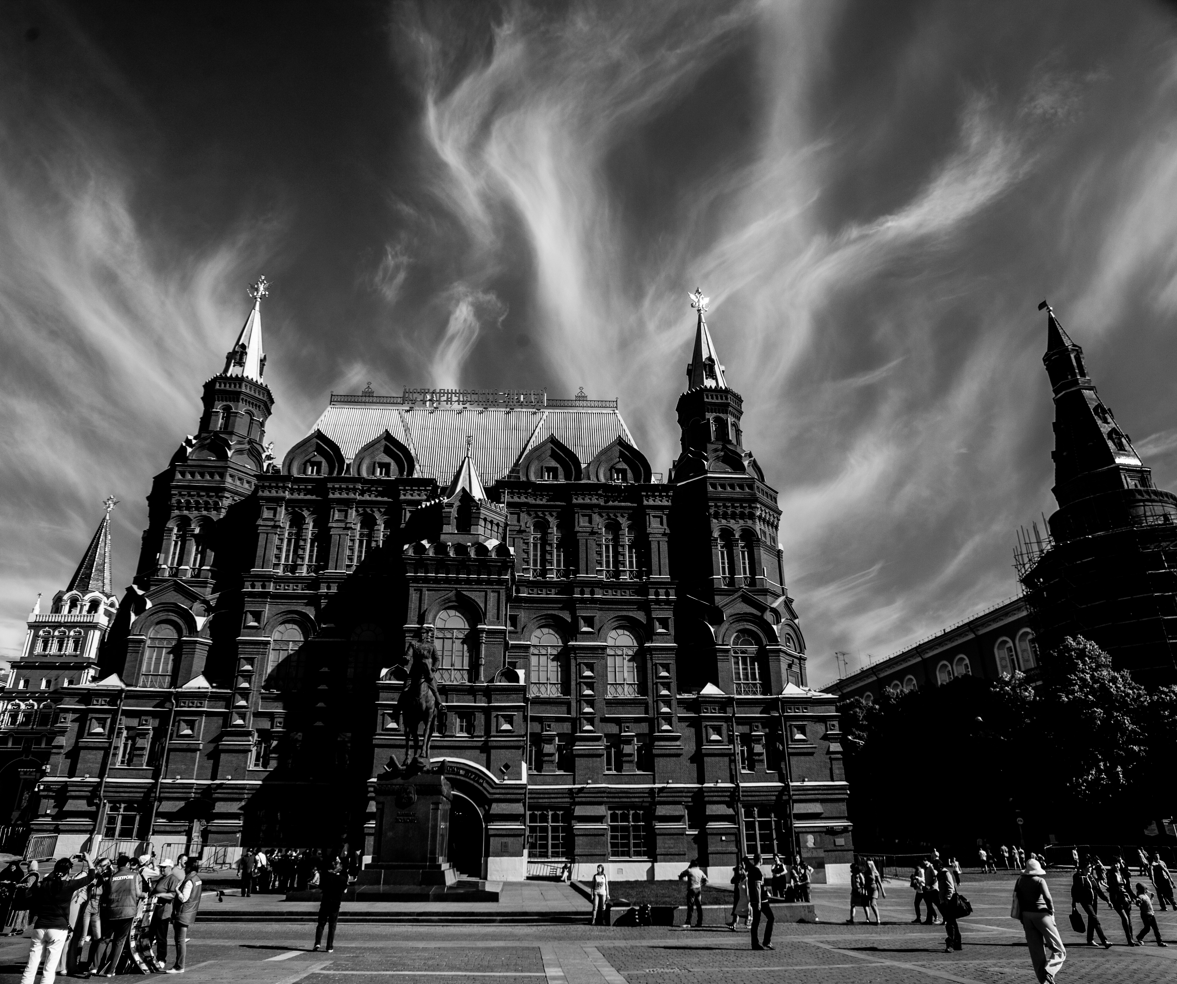 Исторический музей